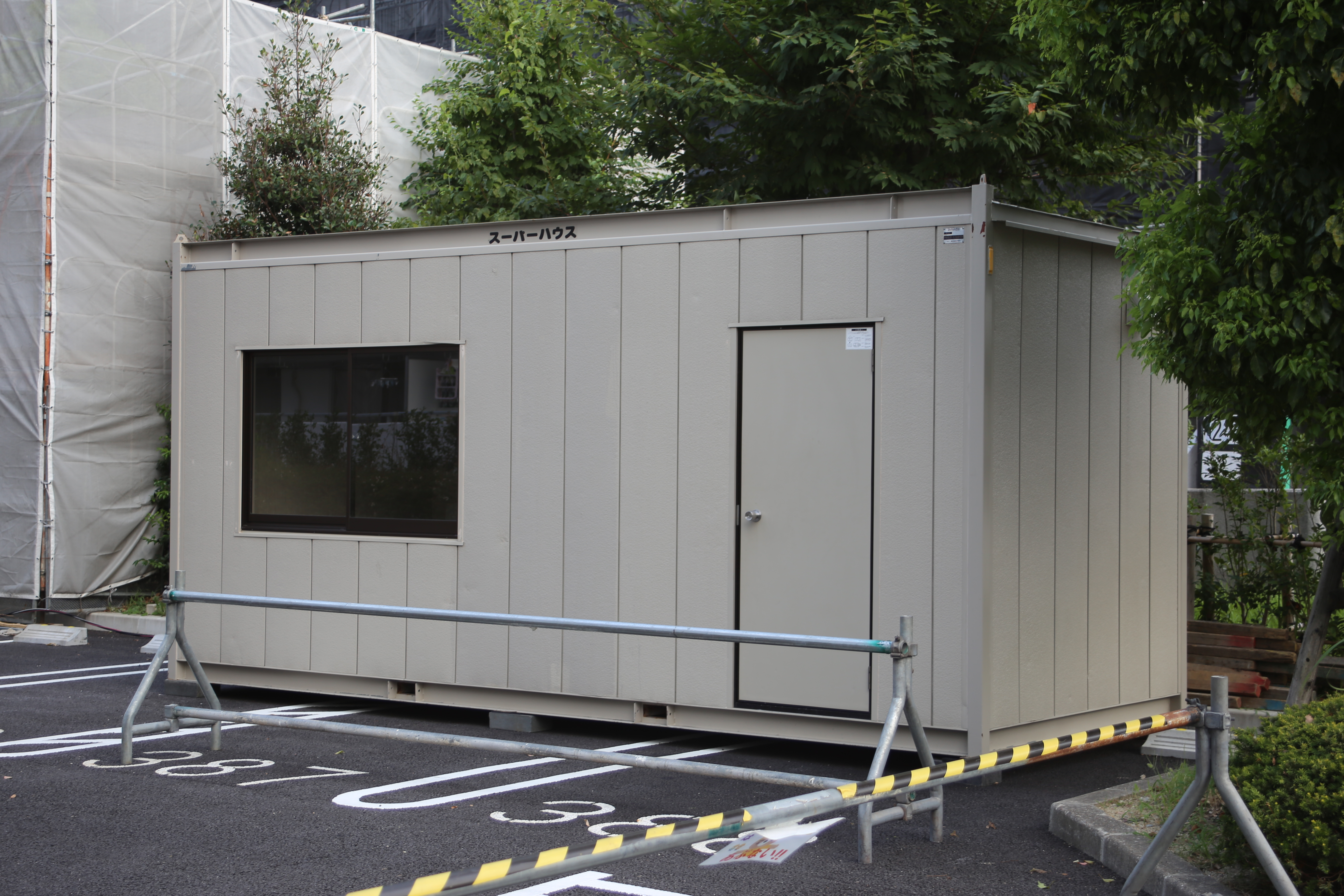 名古屋市北区鳩岡町の工事現場に設置されたプレハブ「スーパーハウス」